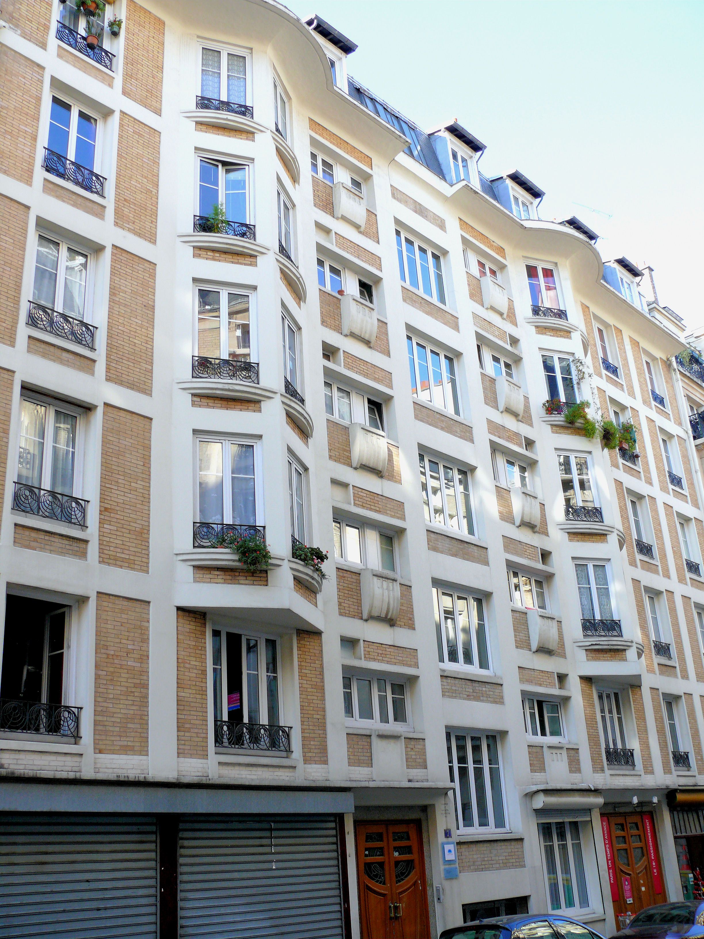 Paris 18ème arrondissement - Immeuble 7 rue de Trétaigne